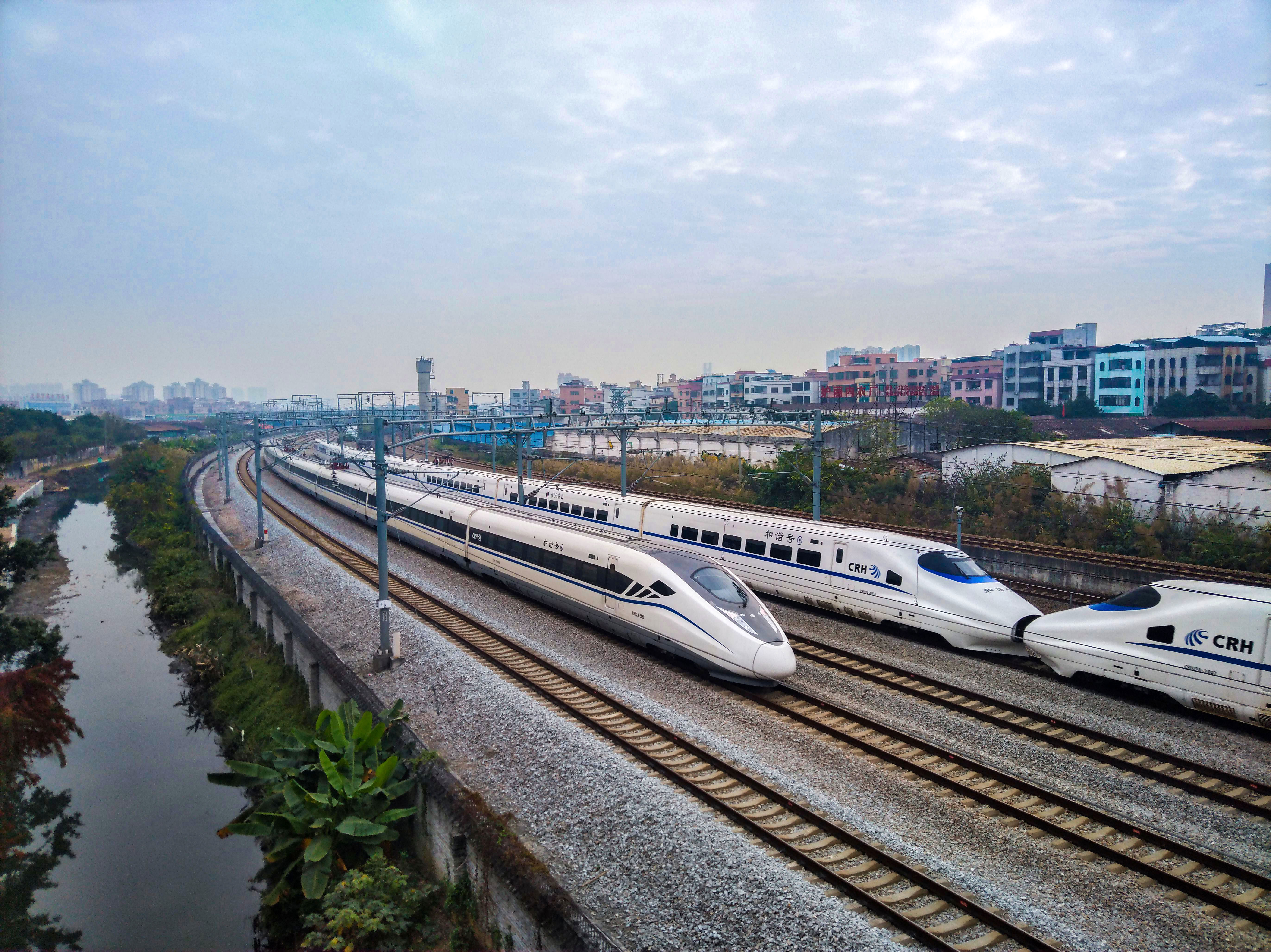 南广线上的普通头型统型CRH2A与贵广客专线上的CRH2G新头型CRH2A经过盐步线路所附近